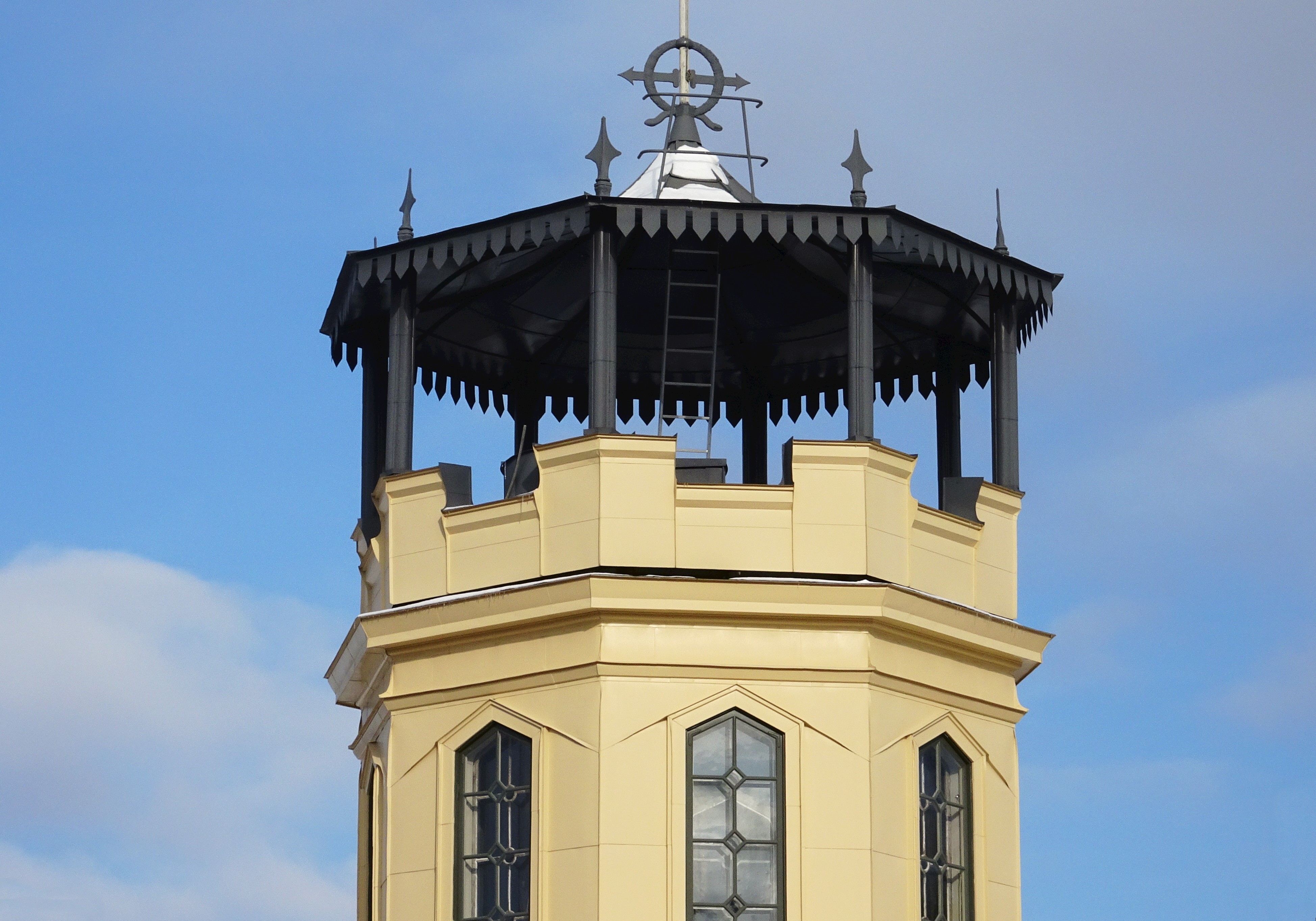 Villa Ludvigsbergs utsiktstorn